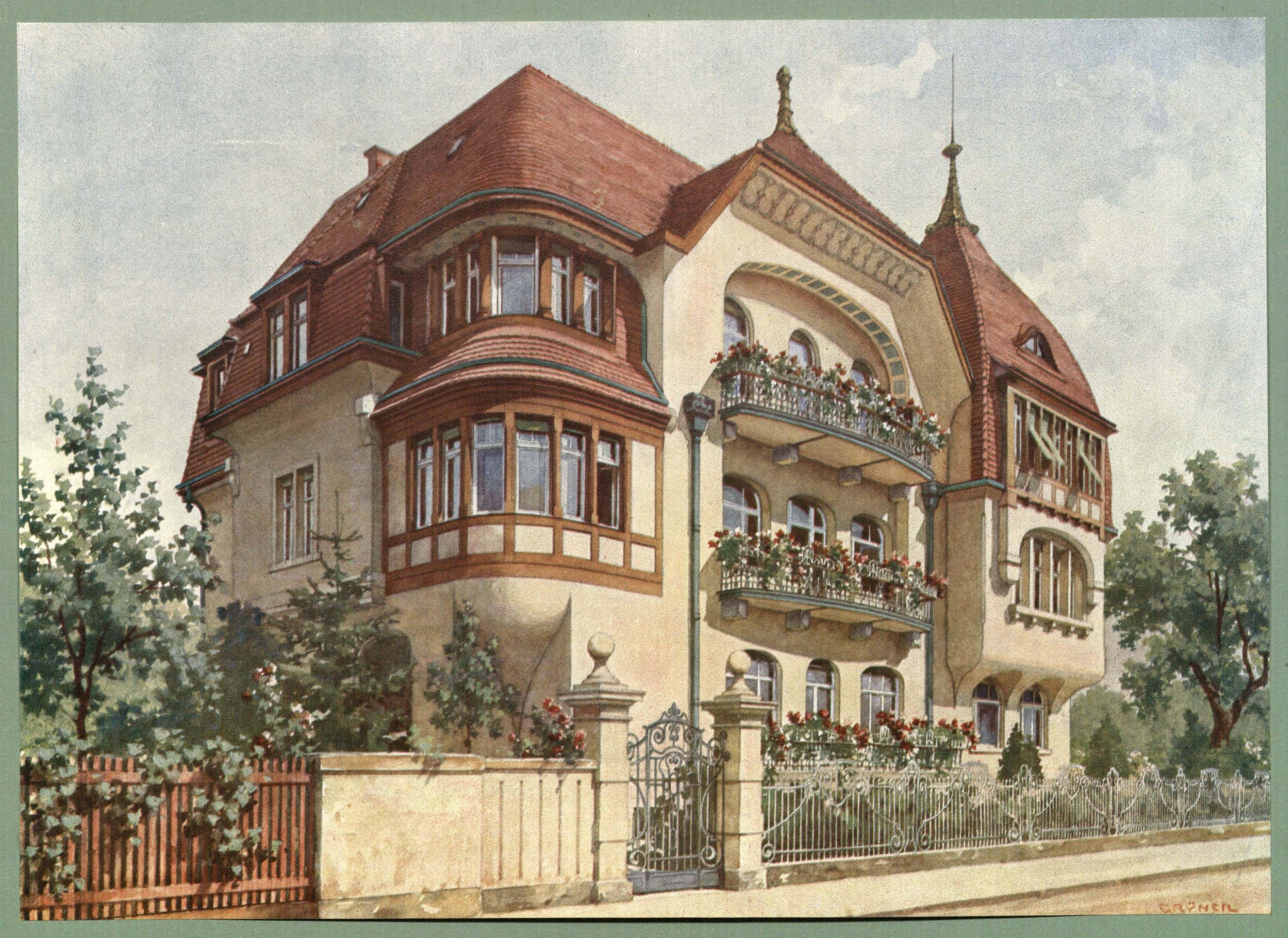 Mietshaus Wägnerstraße 18 (früher Schulstraße 3) in Dresden-Blasewitz, Architekt: Martin Pietzsch. Tafel 41 aus Oscar Grüner: Moderne Villen in Meisteraquarellen. Serie II. 64 Tafeln. Verlag Friedrich Wolfrum & Co. Wien und Leipzig ca. 1905.